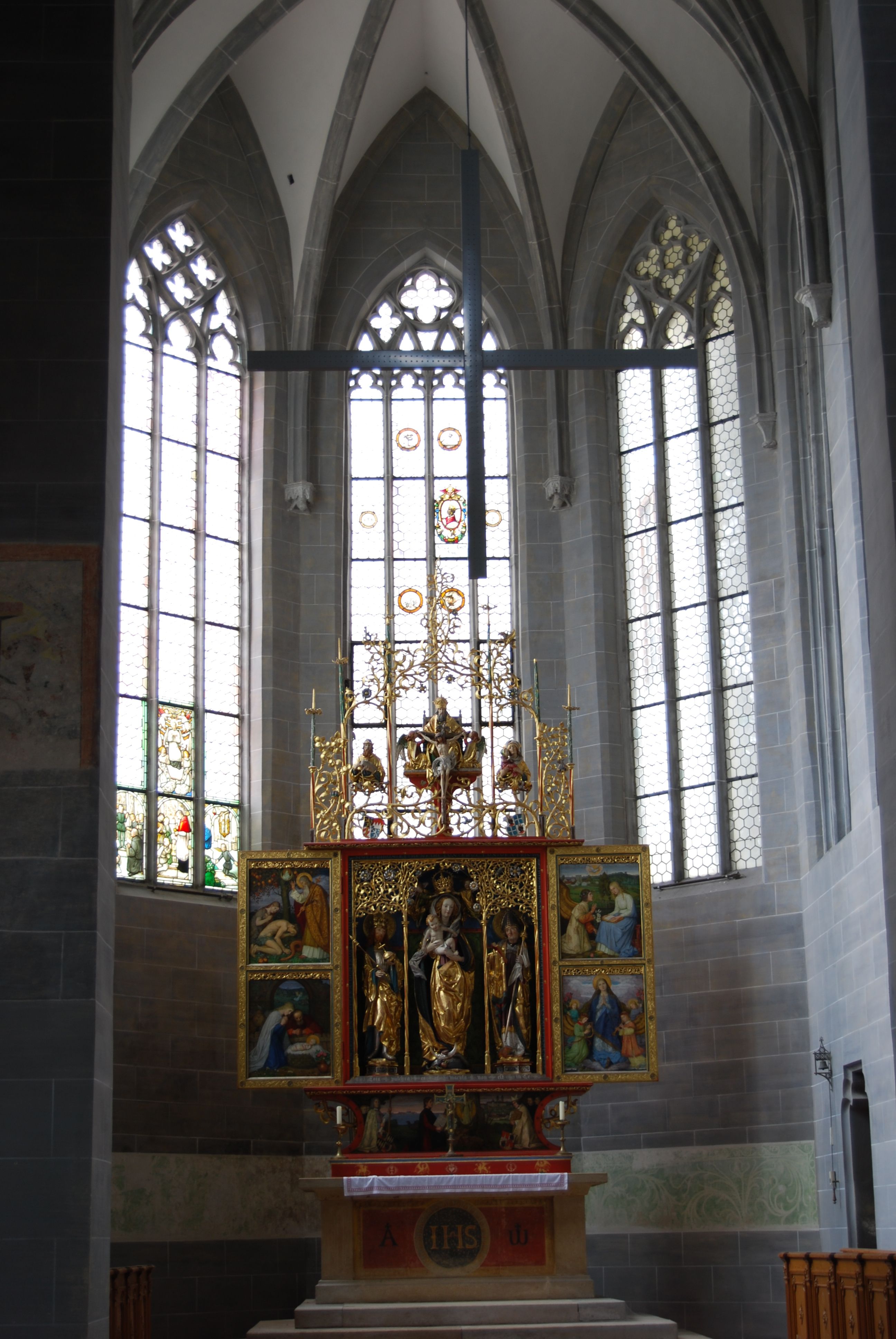 Altarraum der Johanneskirche auf dem Freisinger Domberg.